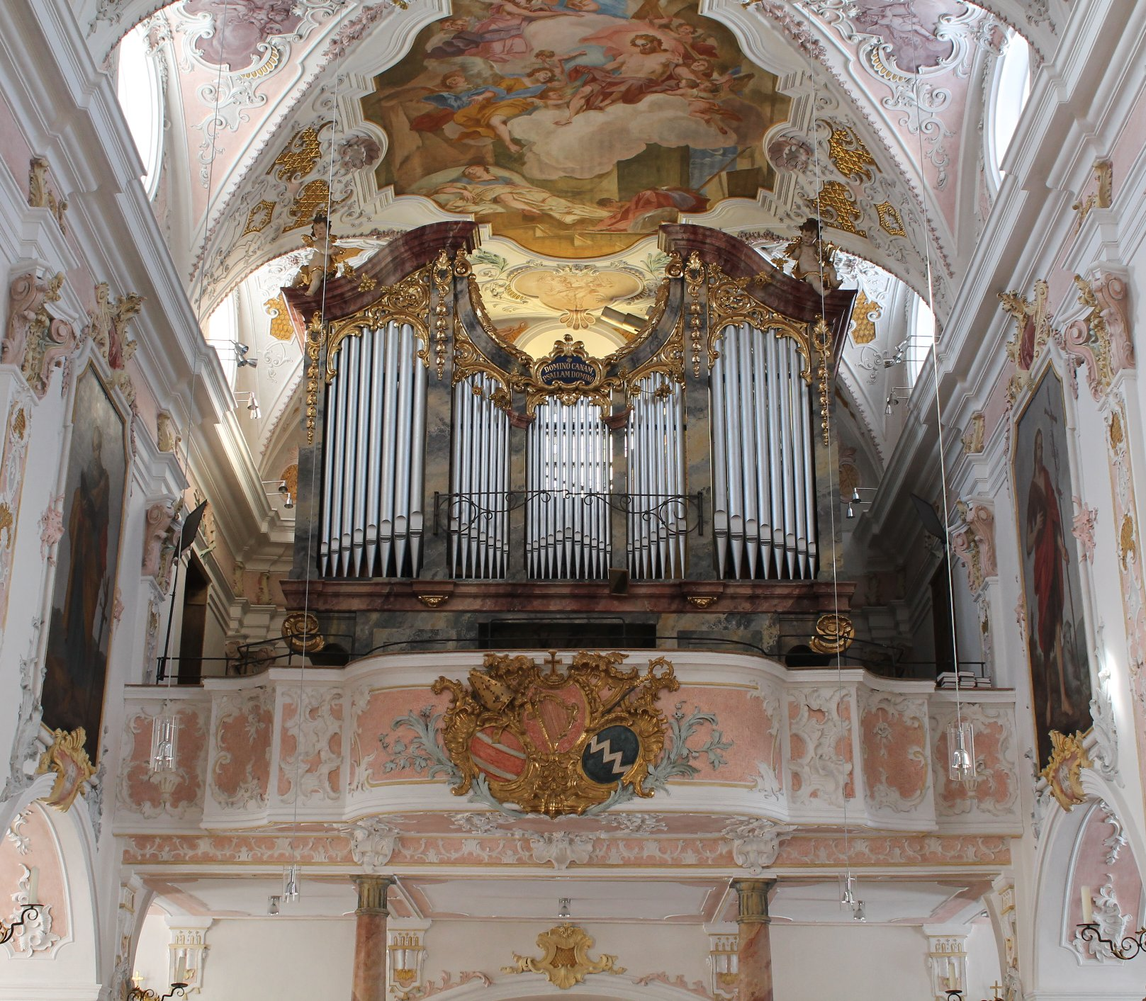 Die Orgel von St. Martin in Fischbachau (1920, L. Nenninger, II/26; Umbau durch A. Staller um 1990)